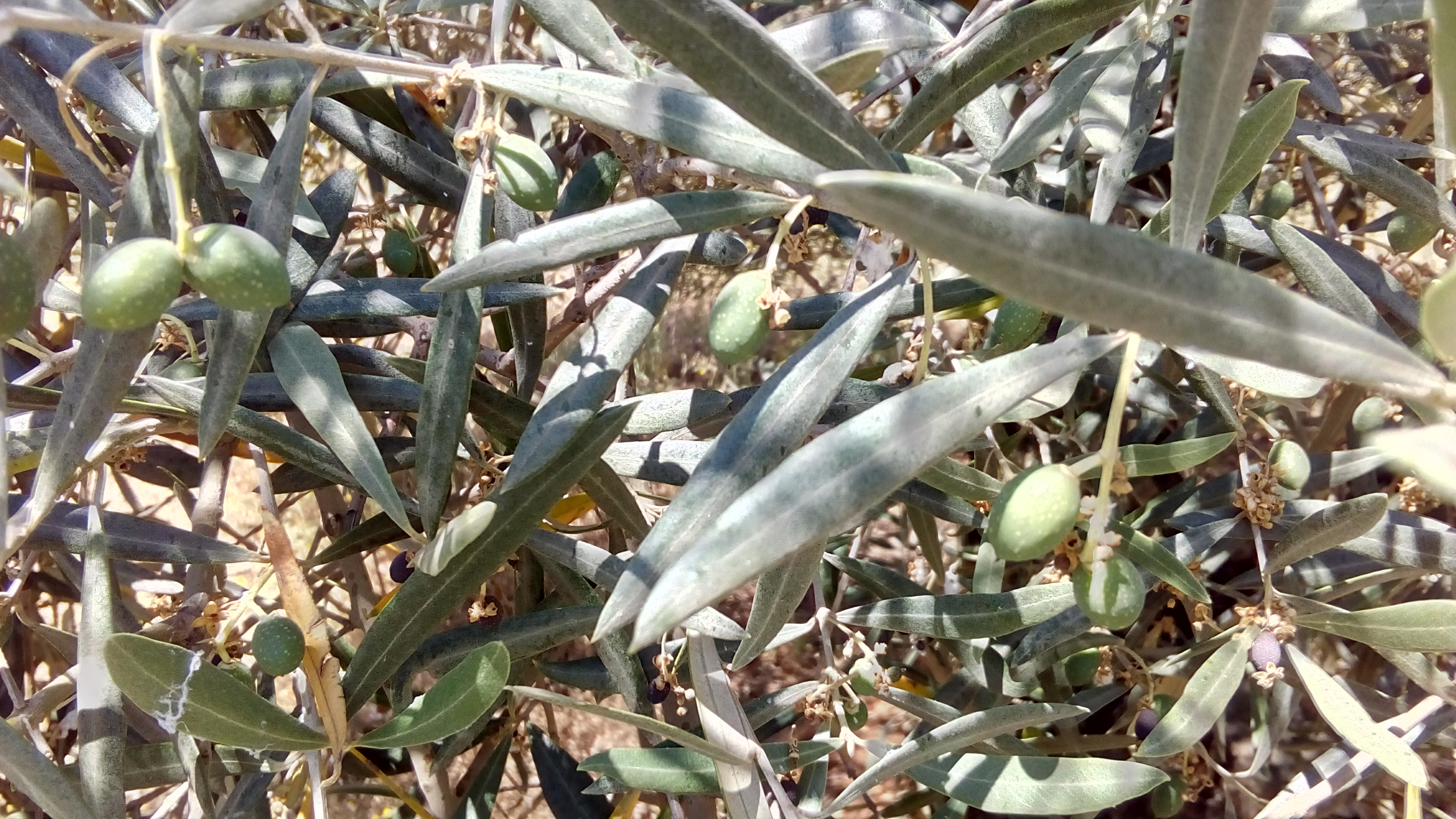 Aceitunas en el olivo